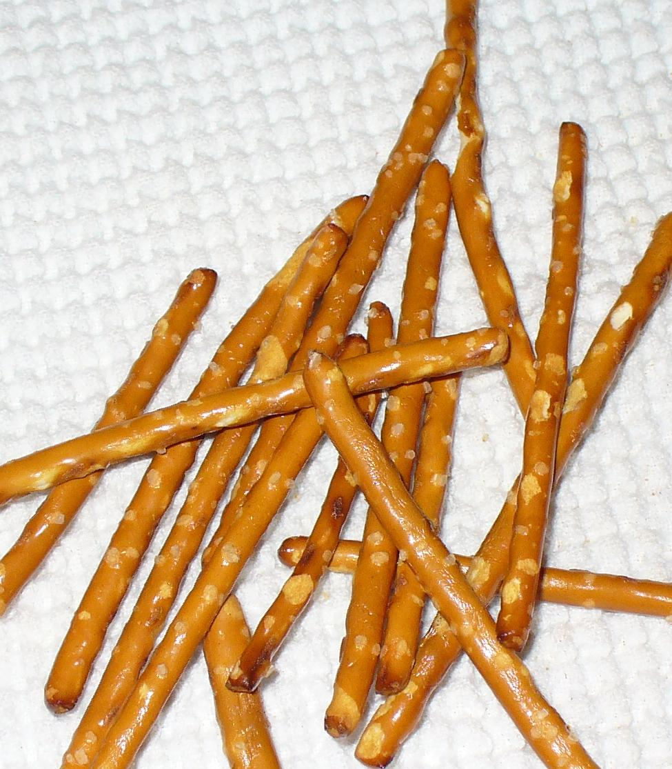 Pretzel sticks